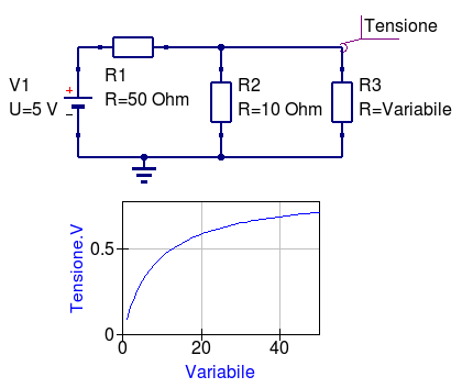 Questo grafico (con relativo circuito) mostra la variazione di tensione (in funzione della resistenza) sull'ipotetico carico all'uscita di un partitore di tensione. È utile per dimostrare che un partitore di tensione non si comporta come un limitatore di tensione, visto che si può fare confusione. L'autore dell'immagine è il sottoscritto (Paolo Di Febbo). Immagine rilasciata sotto licenza CreativeCommons-BY-SA-2.0.